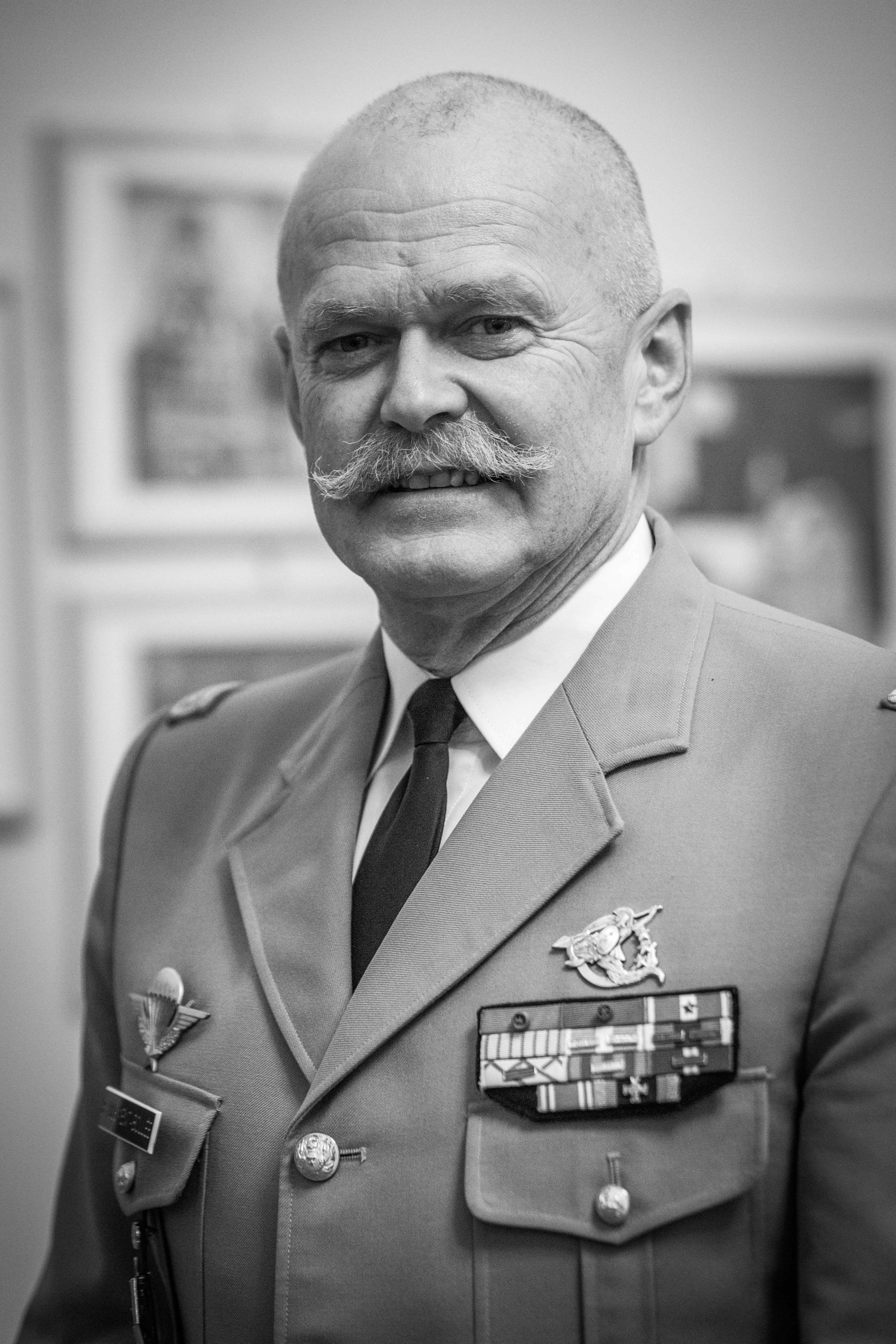 Bertrand Clément-Bollée, né le 19 décembre 1955 à Saumur est un officier général français. Général de corps d’armée, il est nommé le 1er août 2012 commandant des Forces terrestres (COMFT).